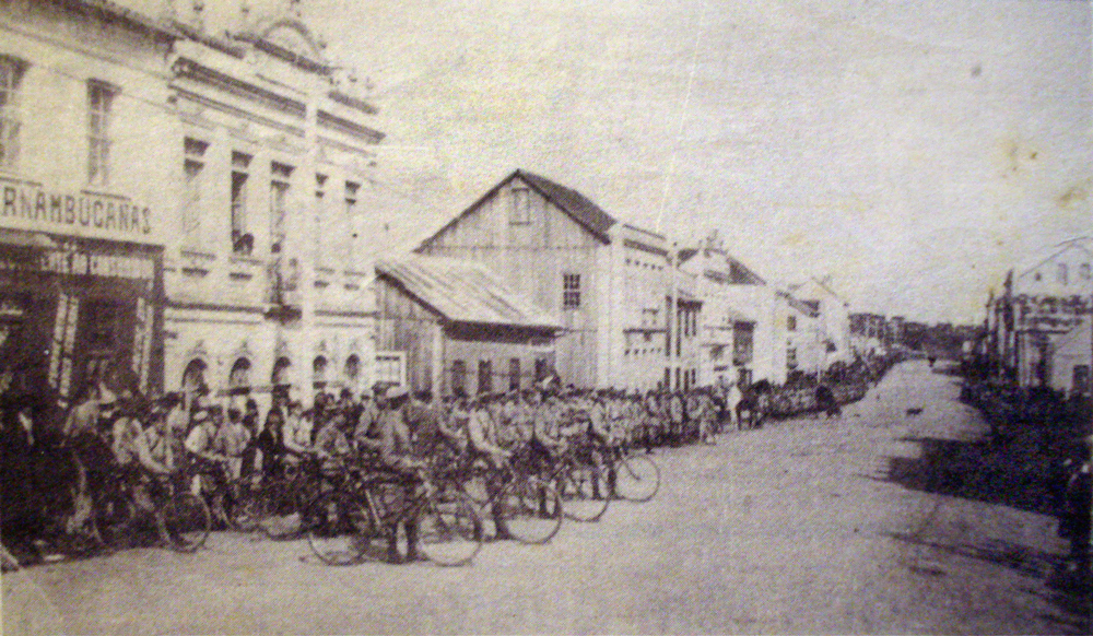 Desfile militar em Caxias do Sul, avenida Júlio de Castilhos